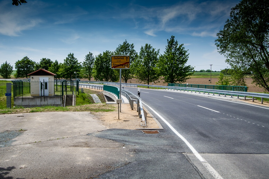 Sachsen, Brückenneubau Bundesstraße 7: Wyhrabrücke bei Streitwald (Einweihung im Mai 2014)